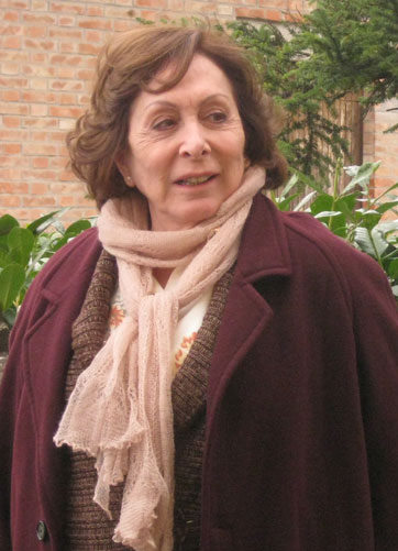 Leandra Leal e Aracy Balabanian